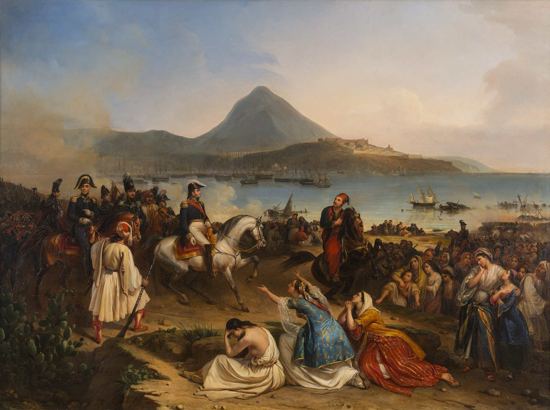 Entrevue du général Maison et d'Ibrahim Pacha, à Navarin, septembre 1828. Intervention française en Morée (1828-1833). Dimensions : 197 x 267 cm. Cadre : 203 x 272,5 x 7,5 cm. Matière et technique : huile sur toile.